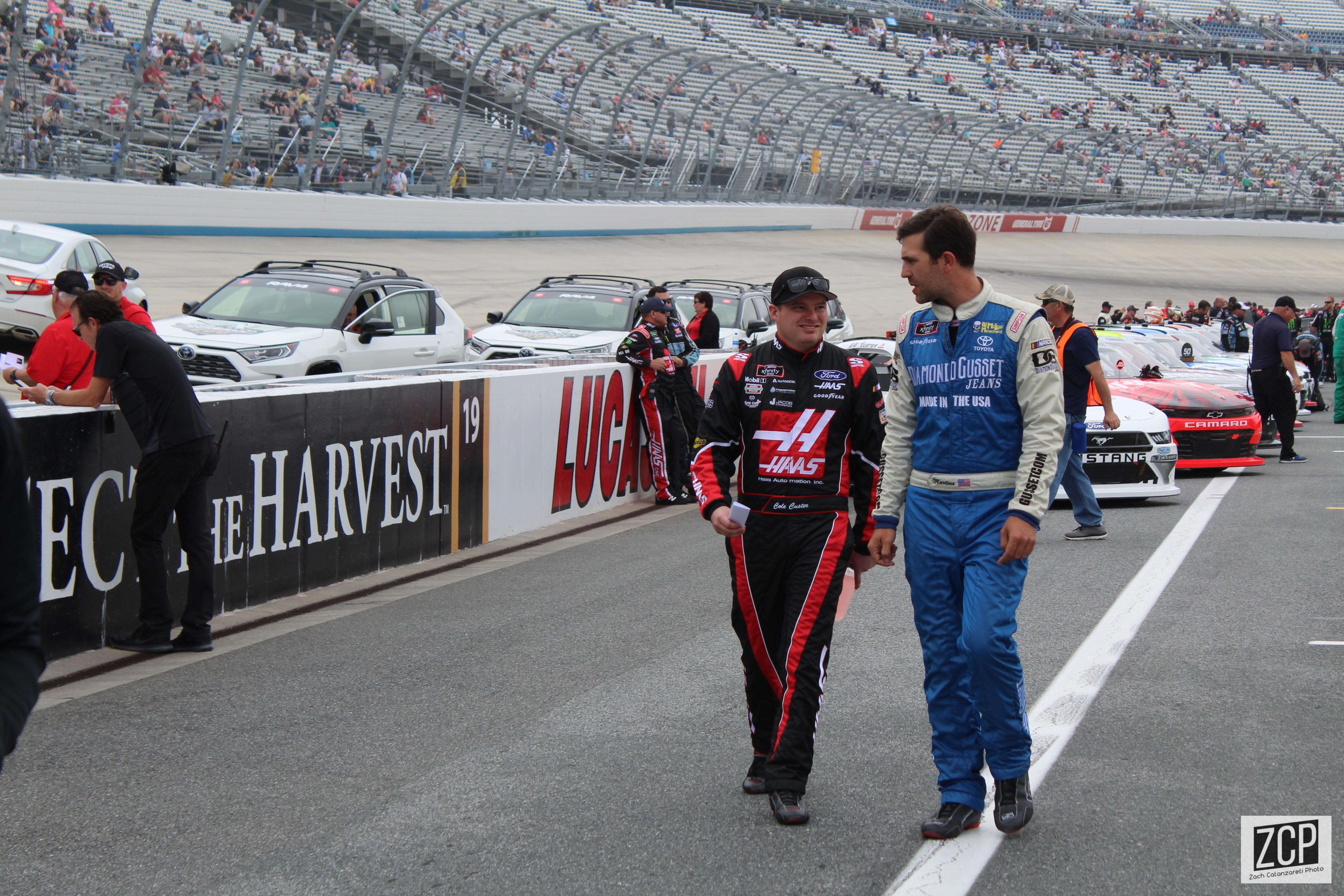 2019 Gander RV 400